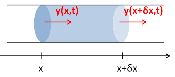 気柱の変位を示す。